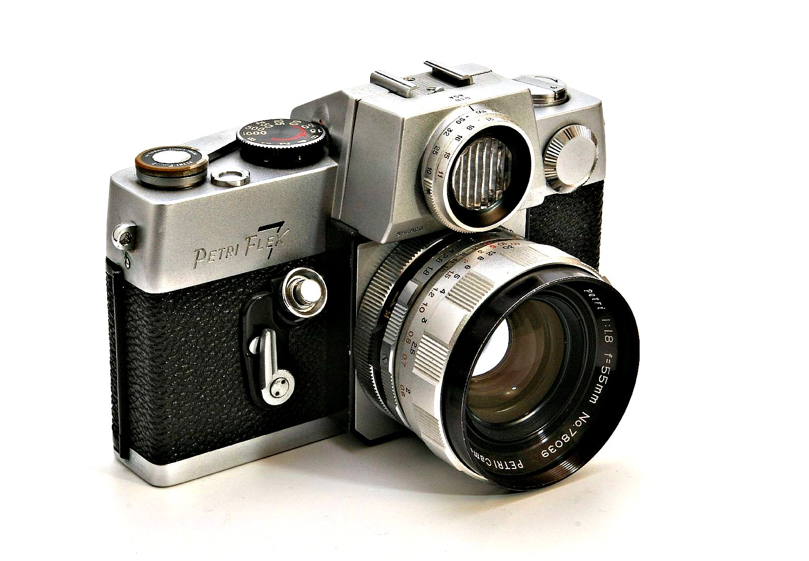 Petri Flex 7